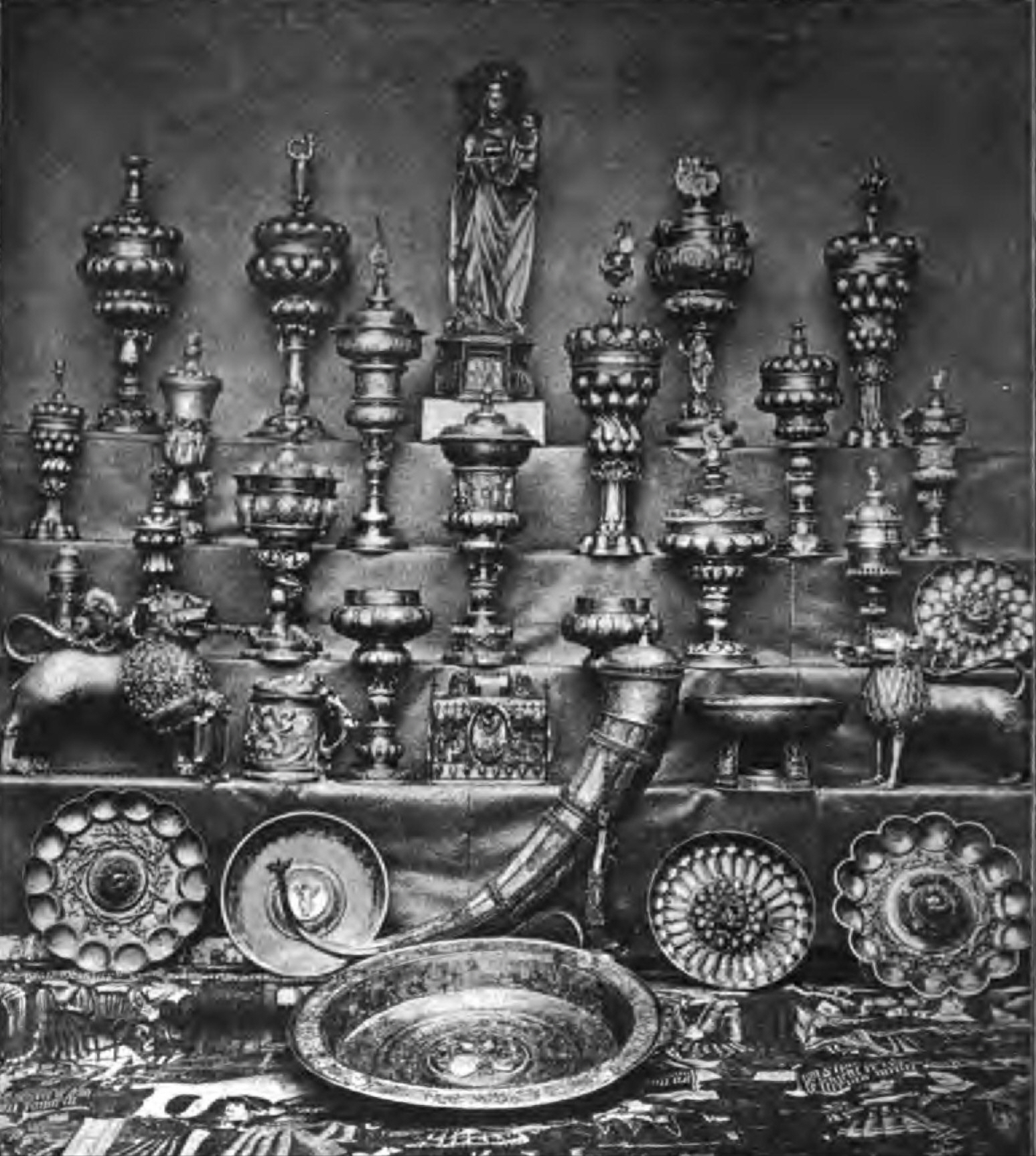 Lüneburg, Rathaus Lüneburger Ratssilber (Galvanokopien)